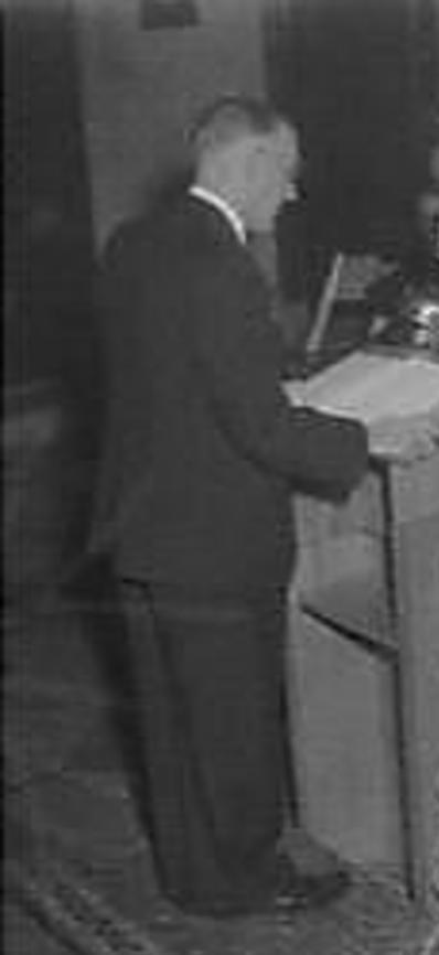 Linnaeuskerk in Haarlem, inleiding door prof. dr. H. J. Lam. 23 mei 1957 (uitsnede van aangetaste foto)